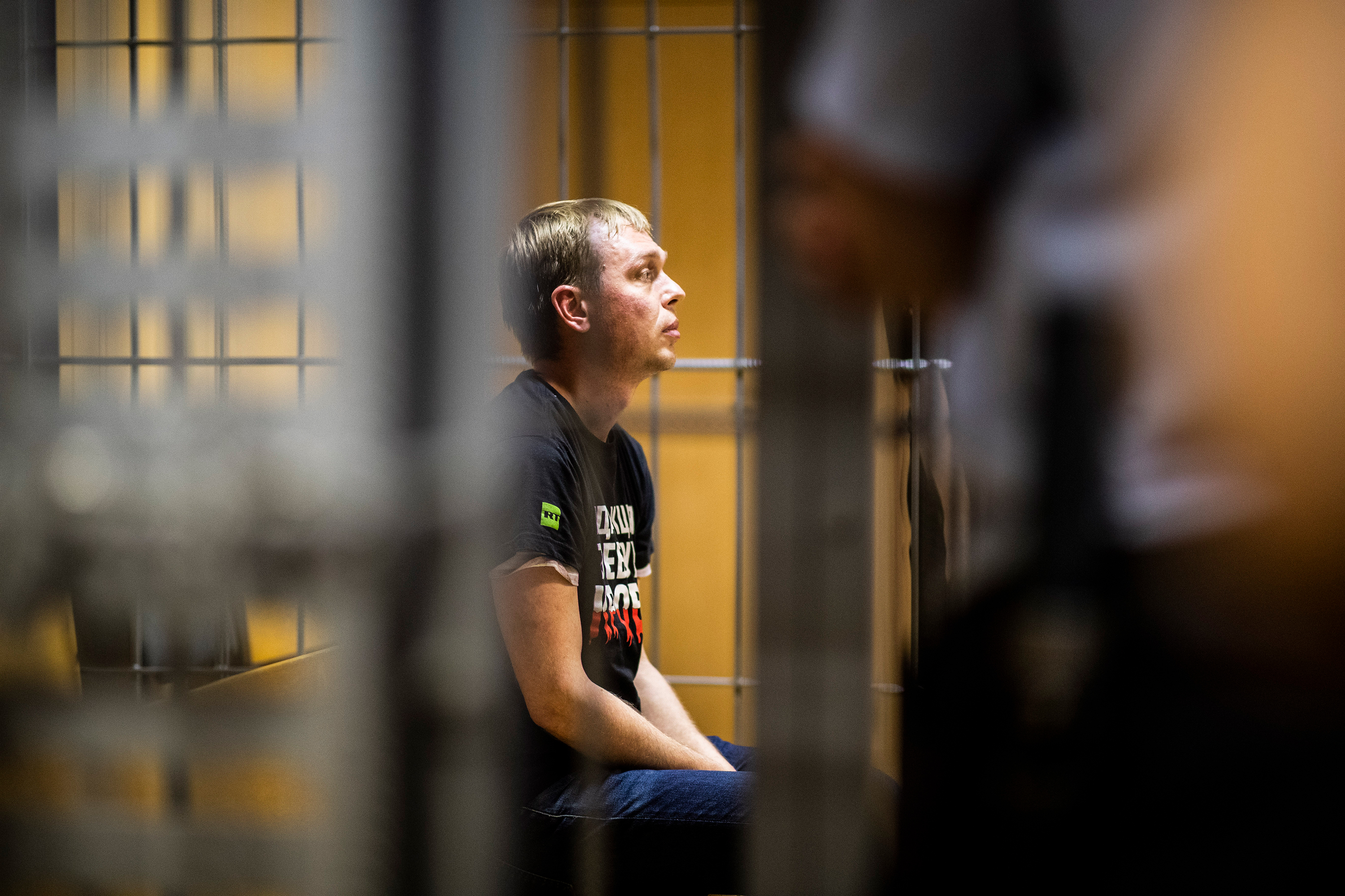 Иван Голунов в зале Никитинского суда. Фото: Евгений Фельдман.